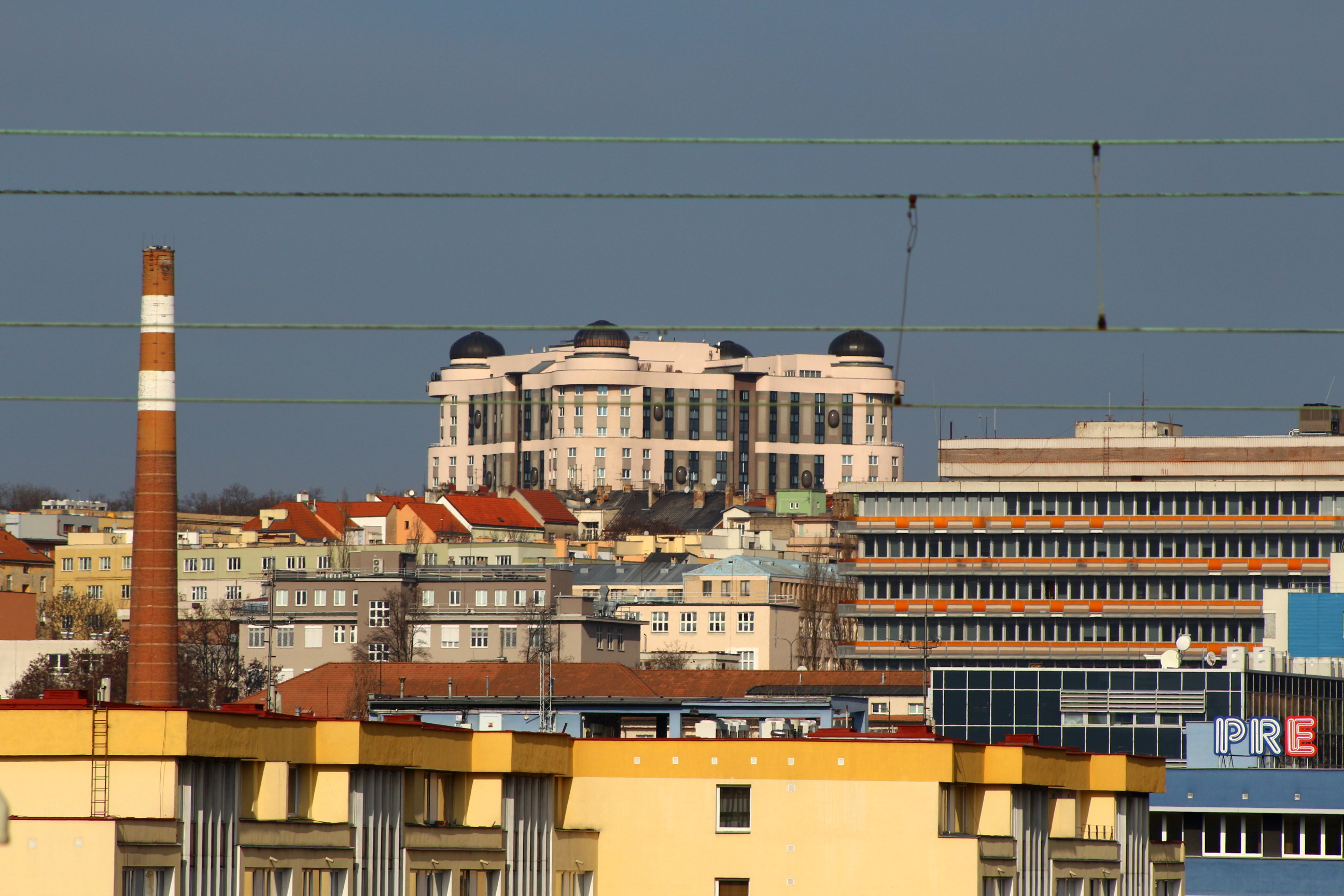 Praha, Želivského, hotel Don Giovanni a metro